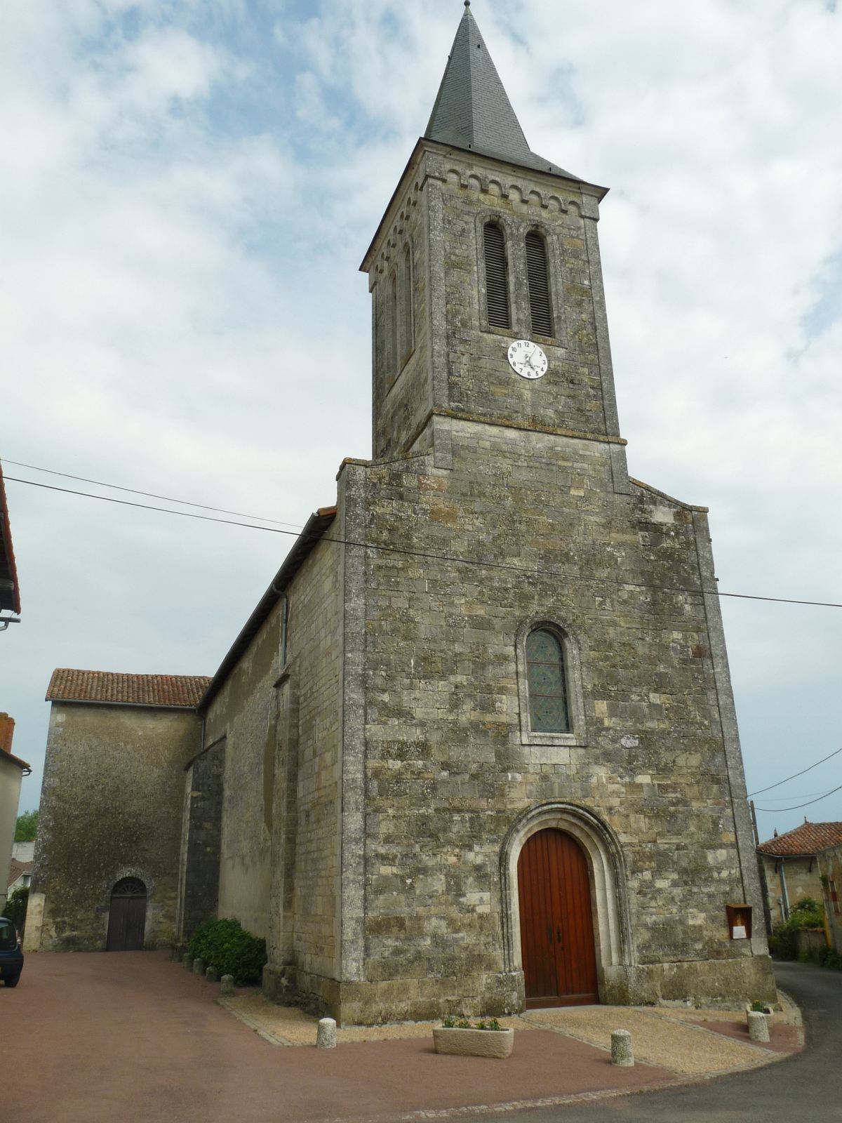 église de St-Laurent-de-Céris, Charente, France